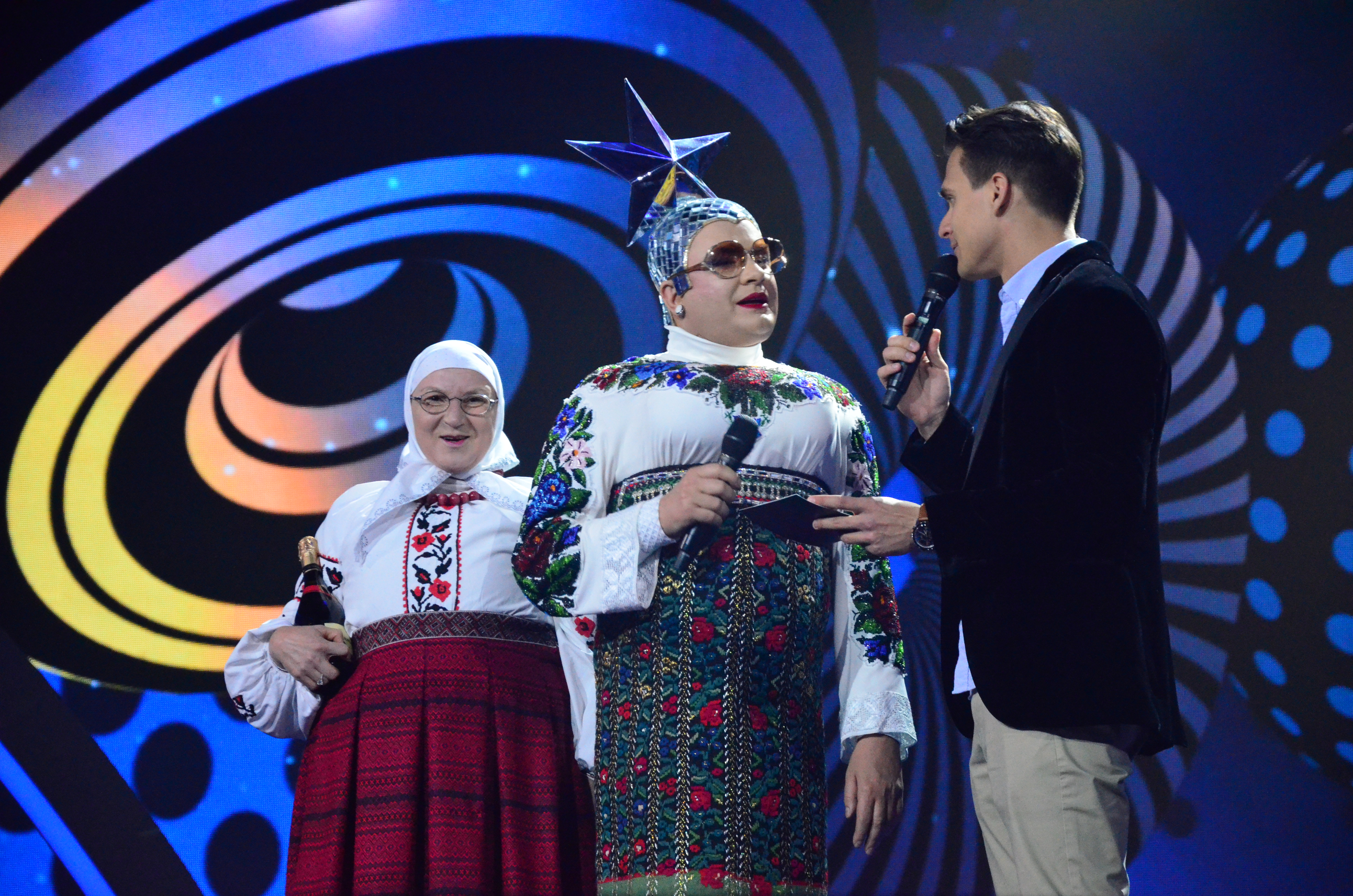 12 травня. Генеральна репетиція фіналу Євробачення 2017. Верка Сердючка.